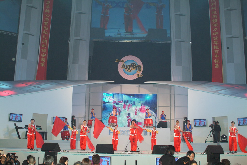 2004年鴻海尾牙晚會表演